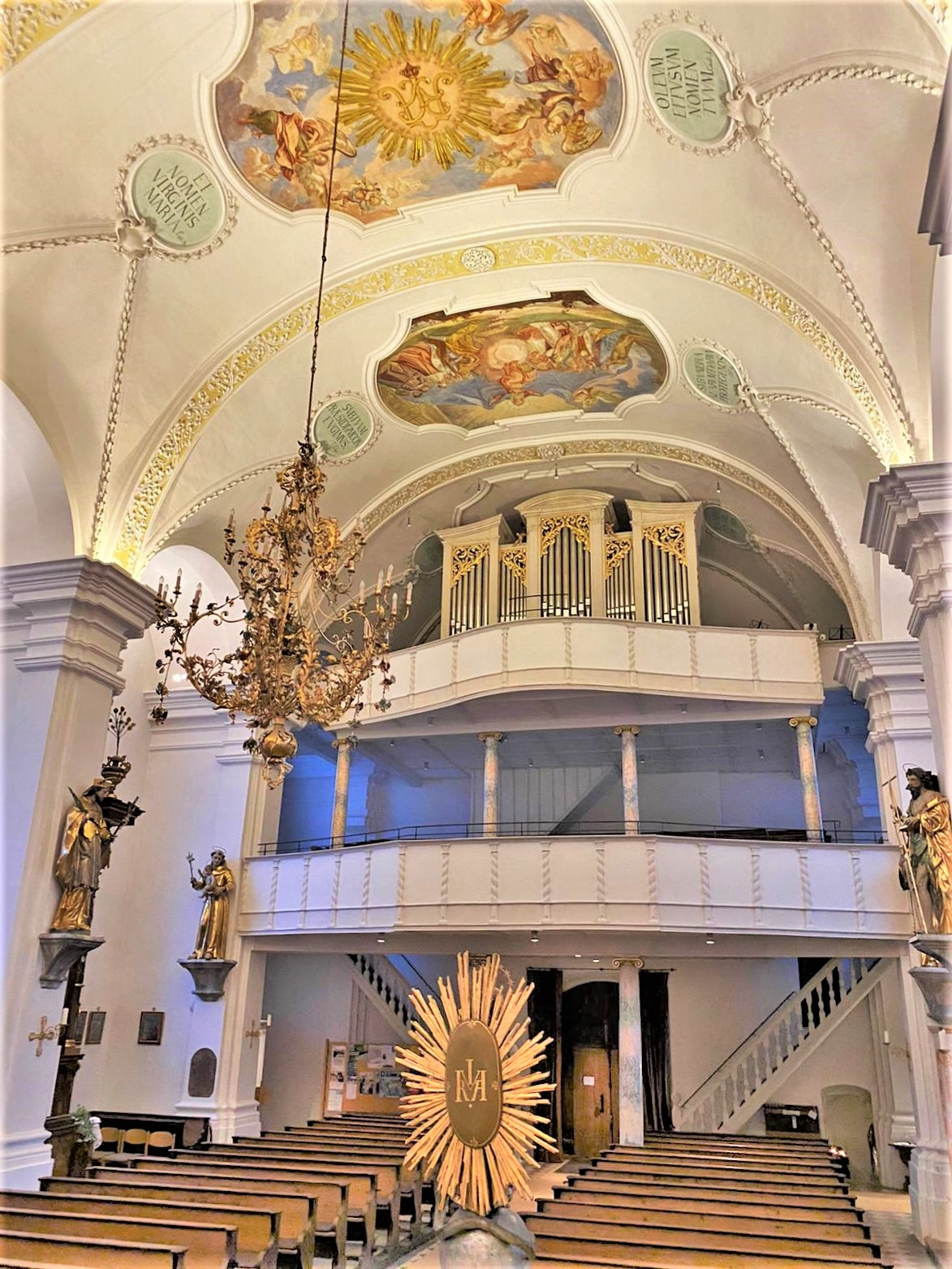 Interior of St. Sixtus (Schliersee)